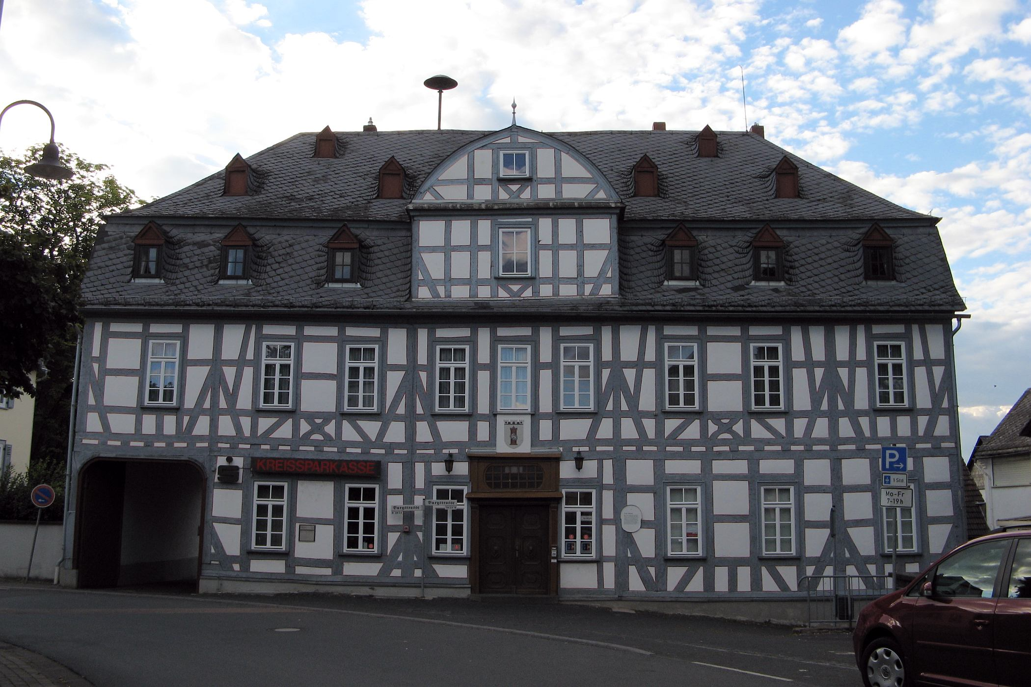 Altes Rathaus Kirberg, erbaut 1610 als Adelshof